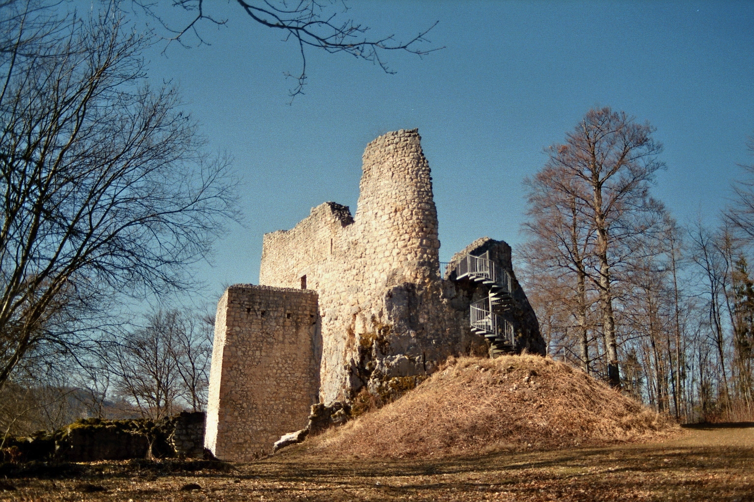 Ostseite mit Aufgang